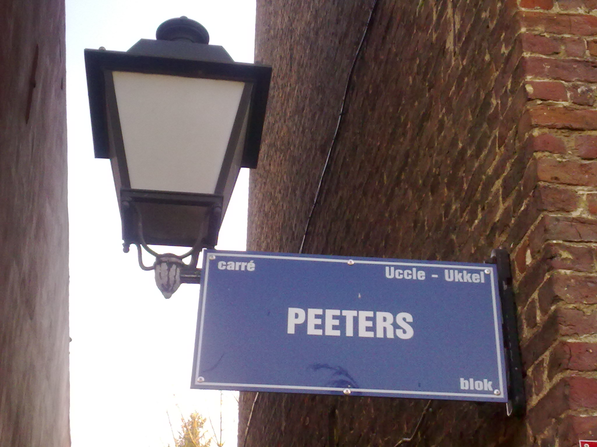 Plaque de rue introduisant au "carré Peeters, ancien habitat ouvrier situé à l'intérieur de l'îlôt. Uccle (section de Bruxelles)